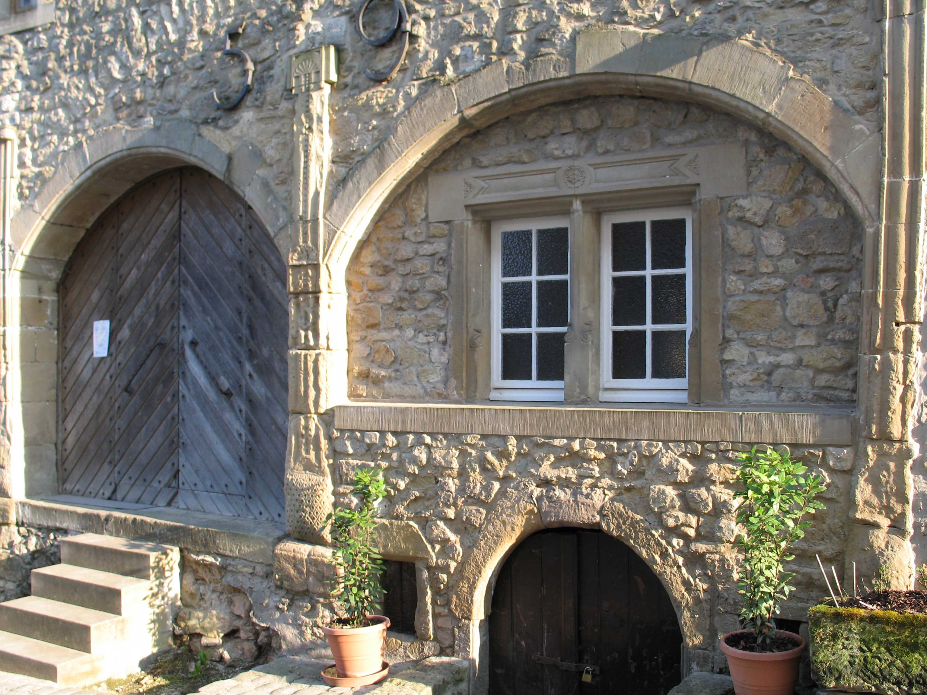 Haus Einen. Kategorie:Gemeng Wuermeldeng